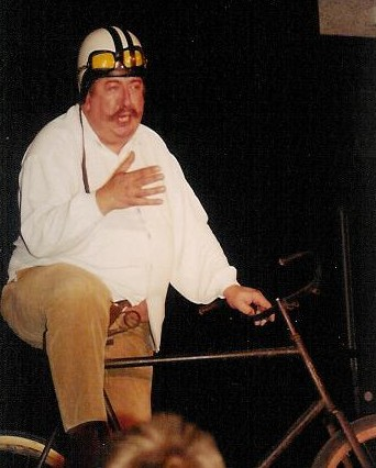 Ronny Coutteure, spectacle "Belges histoires" à Coudekerque-Branche